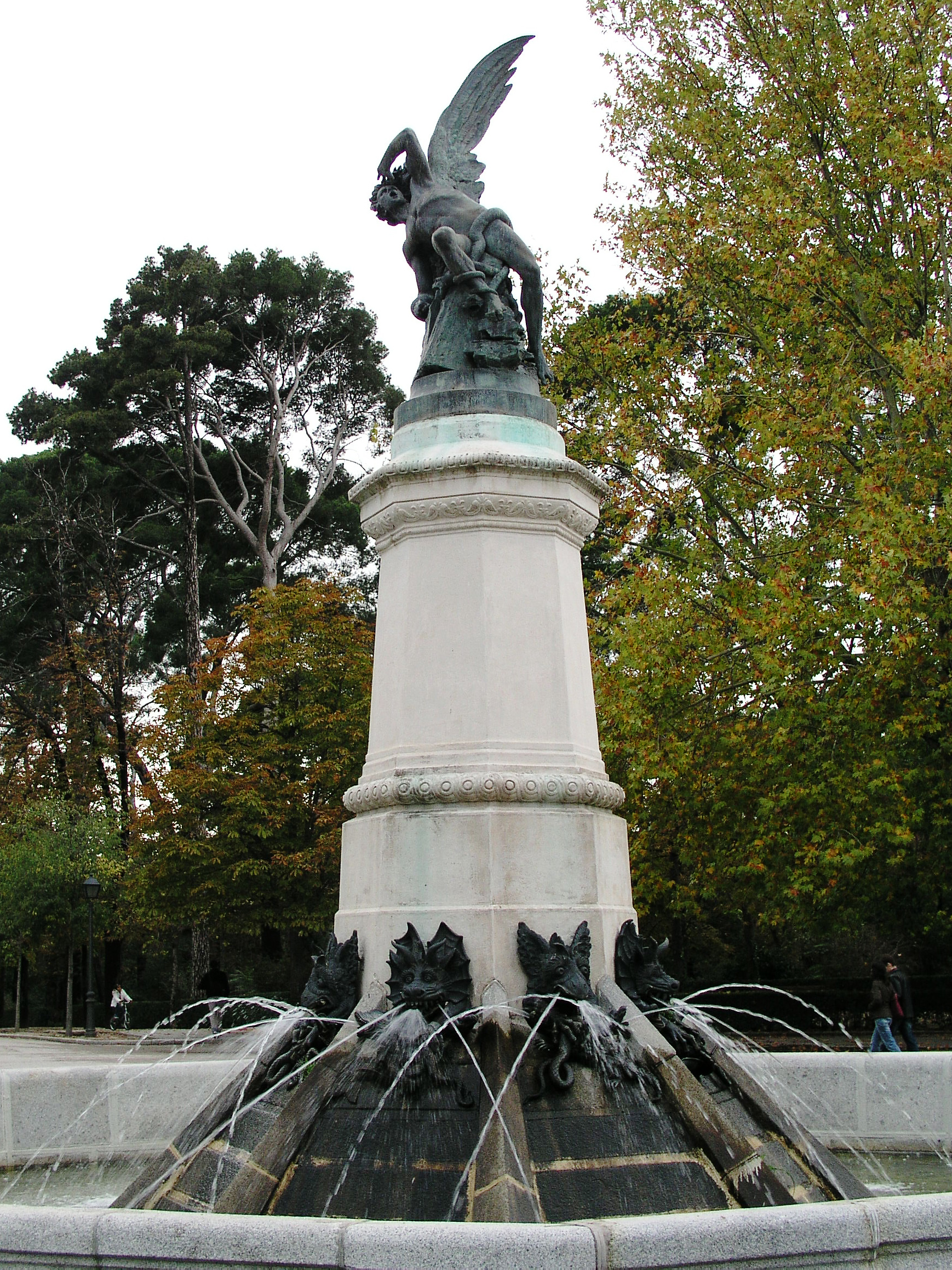 El Ángel Caído / The Fallen Angel. Jardines del Buen Retiro, Madrid, Spain.